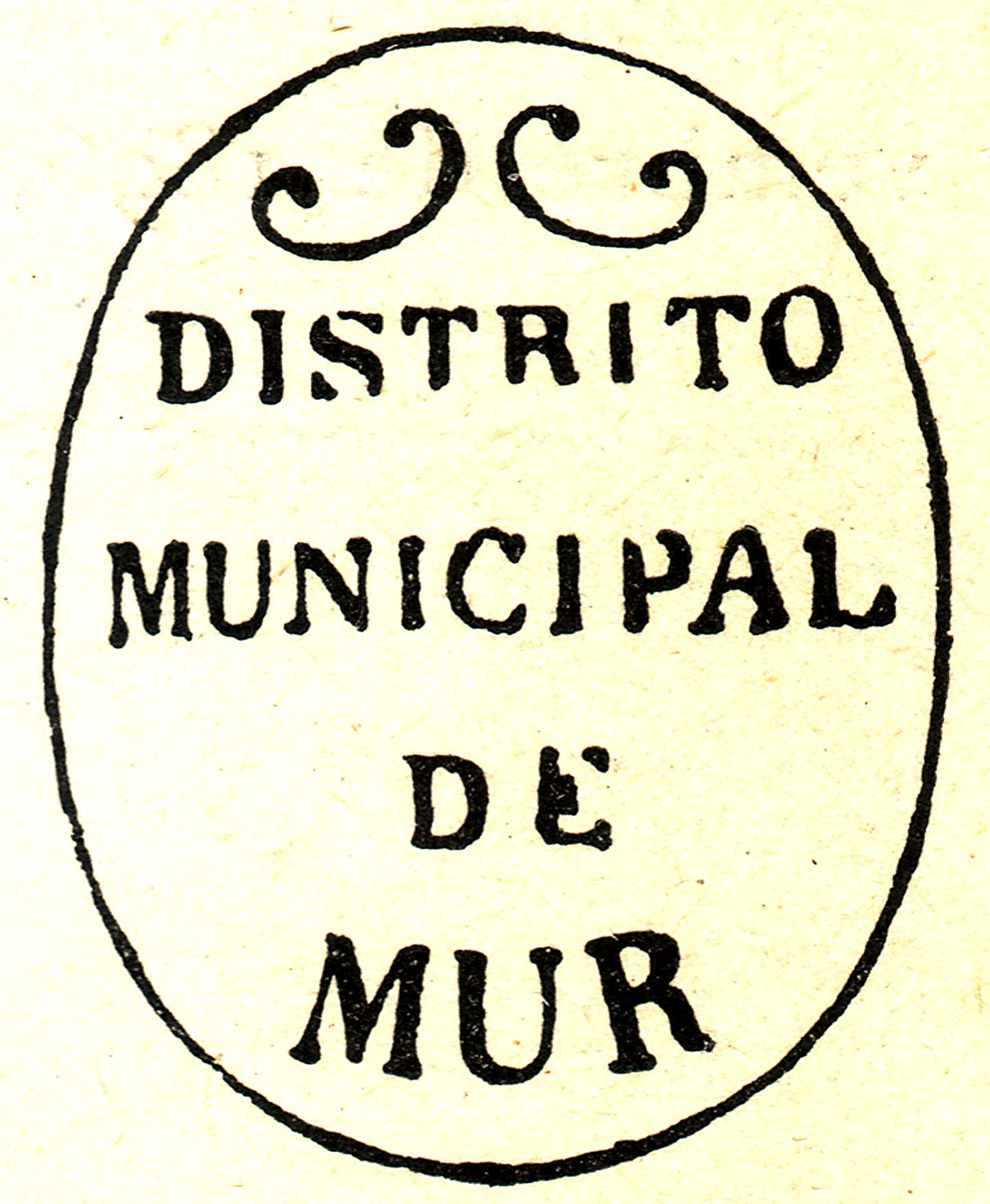 Segell municipal de l'ajuntament de Mur (Castell de Mur, Pallars Jussà)